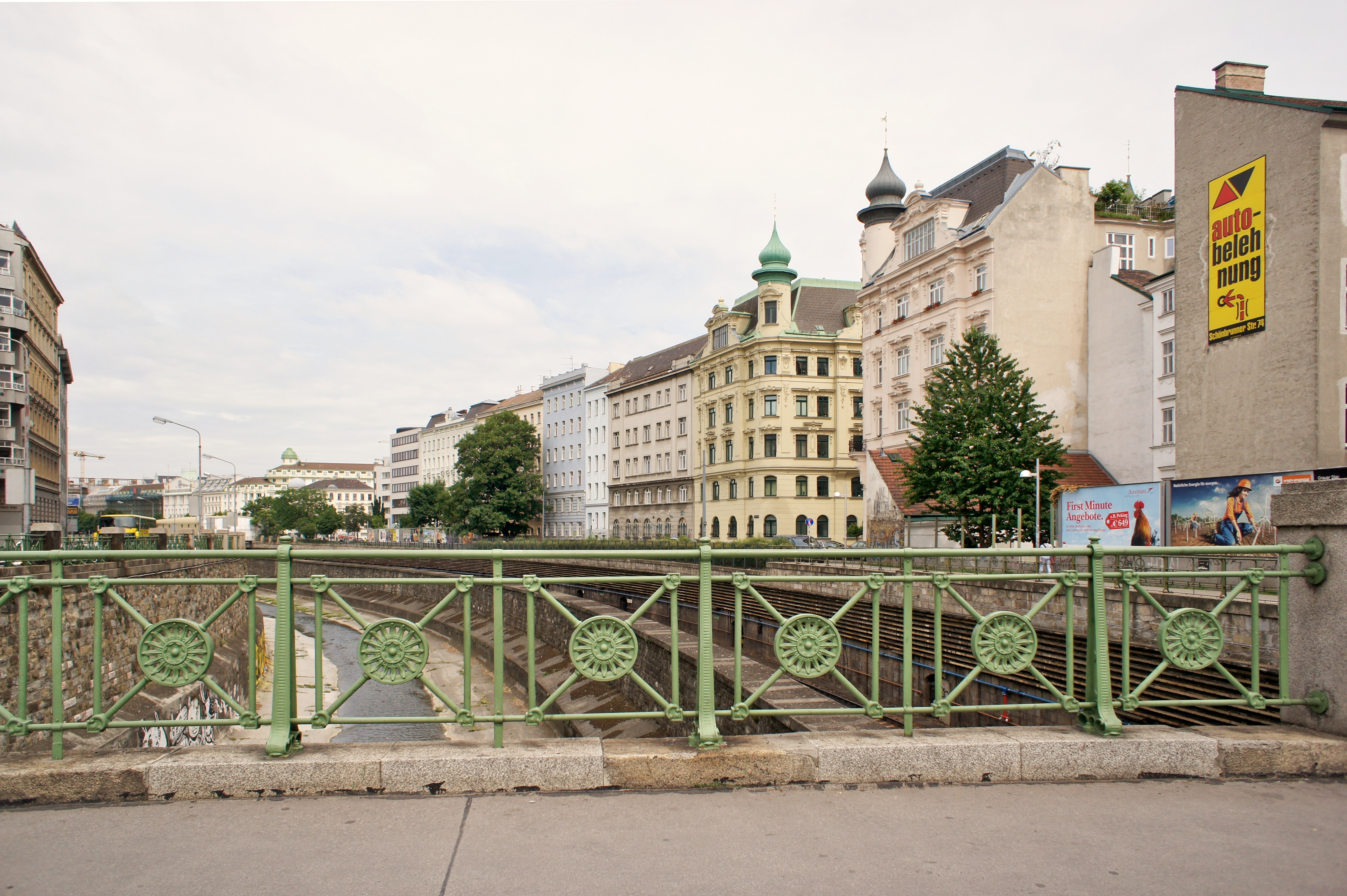 ehem. Stadtbahn - Teilbereich der heutigen U4 und Wienfluss. Blick von der Reinprechtsdorferbrücke stadteinwärts.